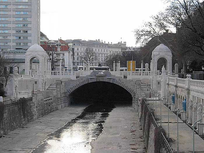 Wienflussportal beim Konzerthaus Beschreibung: Foto Wienfluss Stadtpark 7.12.2003 Quelle: eigenes Foto Fotograf oder Zeichner: Extrawurst Andere Versionen: - Lizenzstatus: GNU FDL